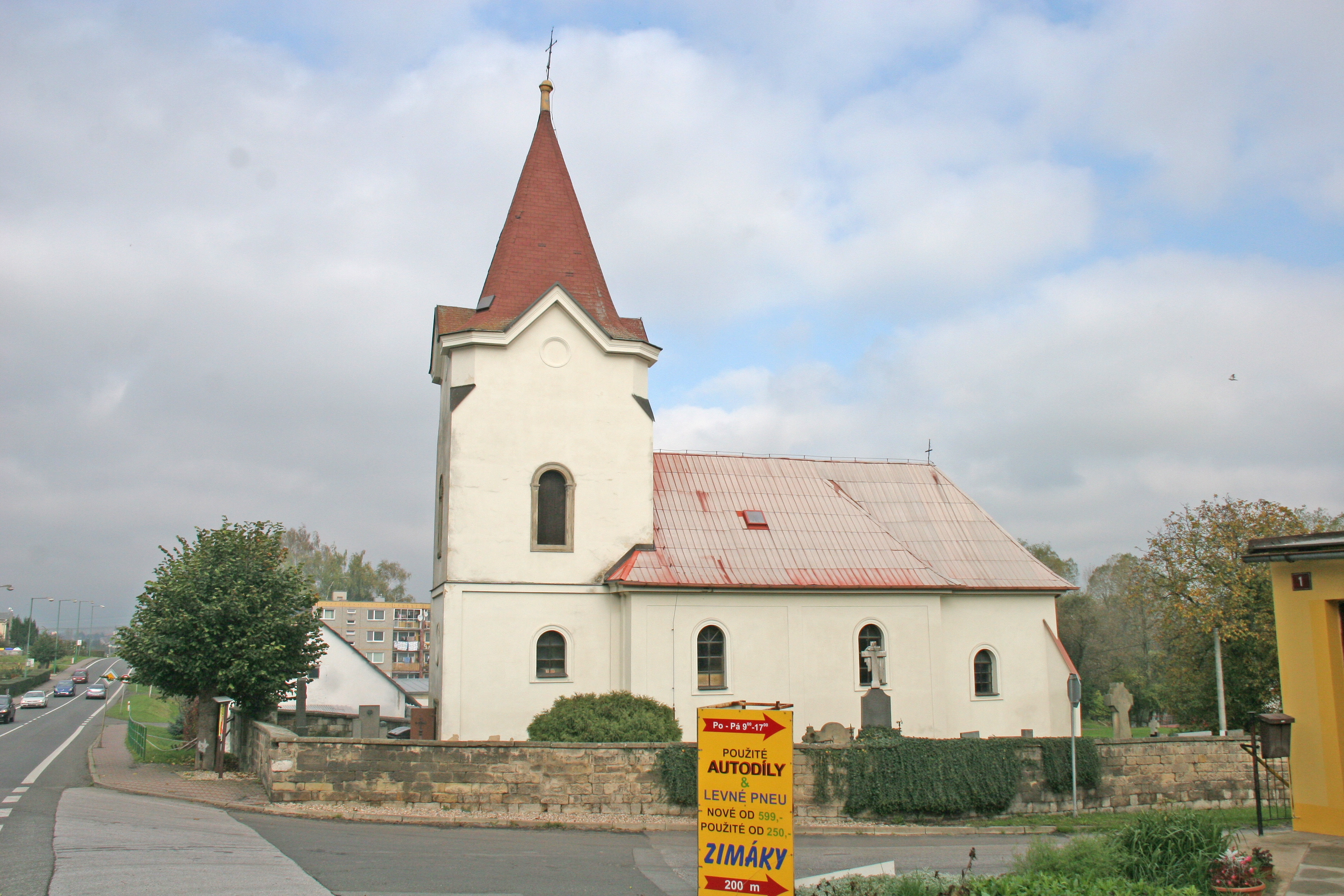 Kostel svatého Františka Serafinského, Staré Místo.